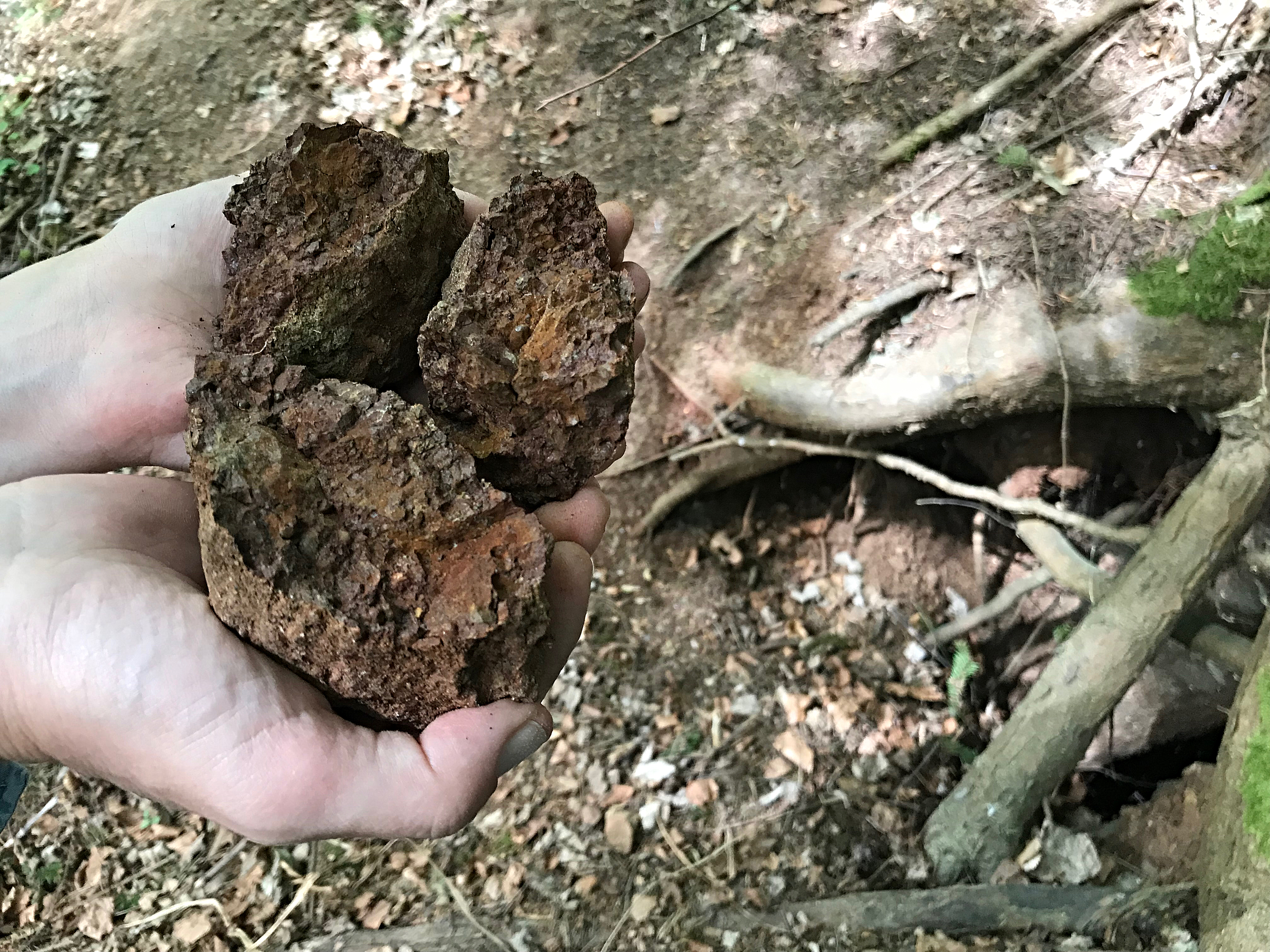 Aufgenommen bei Erhebungen des Quartiervereins Rombachtäli bei Erhebungen, am Eingang des Erlachstollens.